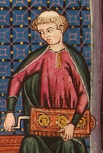 Sinfonía de Cantiga 160, Cantigas de Sta. María, Alfonso X El Sabio, Códice de El Escorial. (1221-1284)